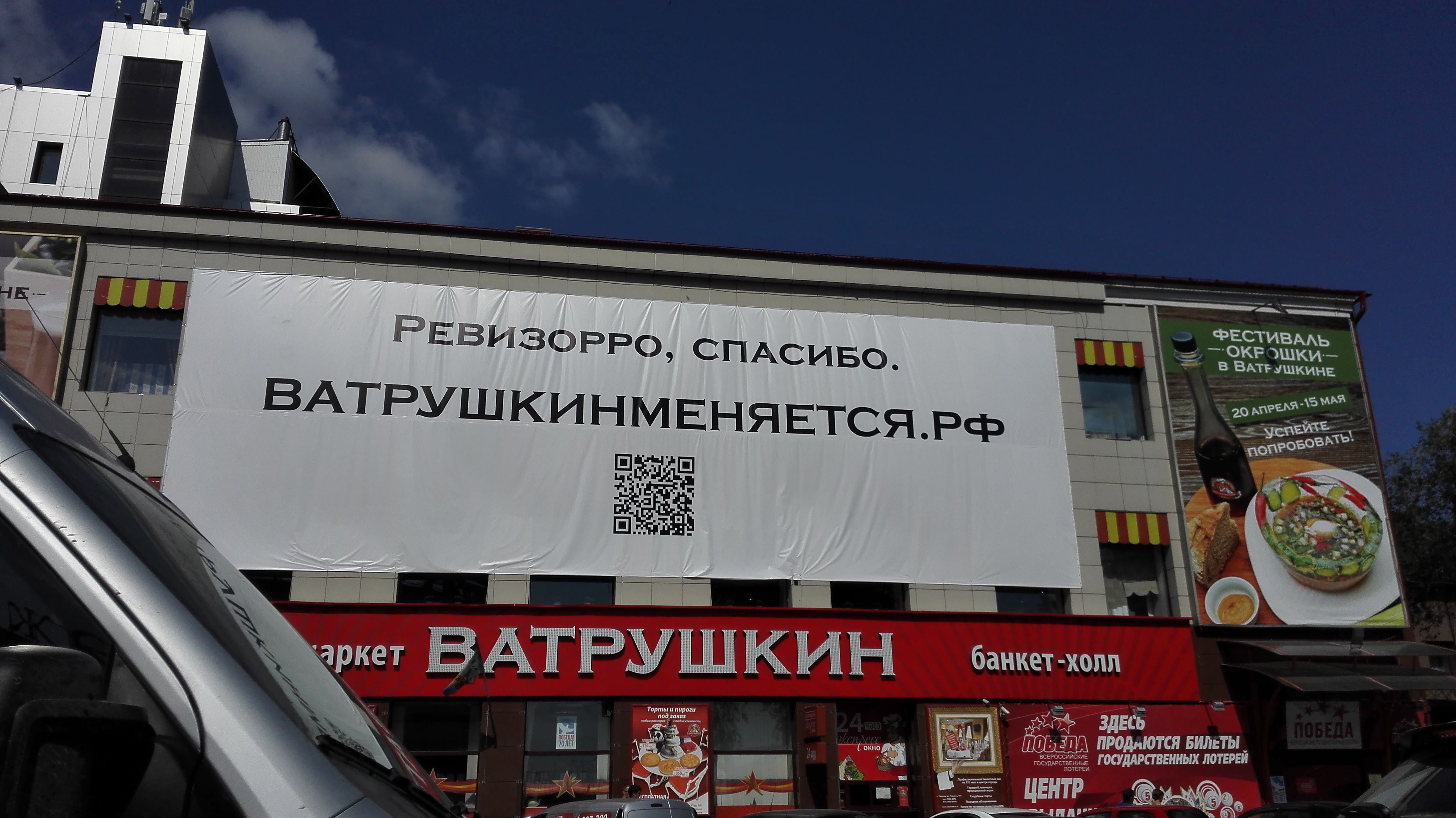 Kafejo Vatruŝkin dankas televidprogramon Revizoro pro merita kritiko. Herzen-strato, Tjumeno, Rusio.